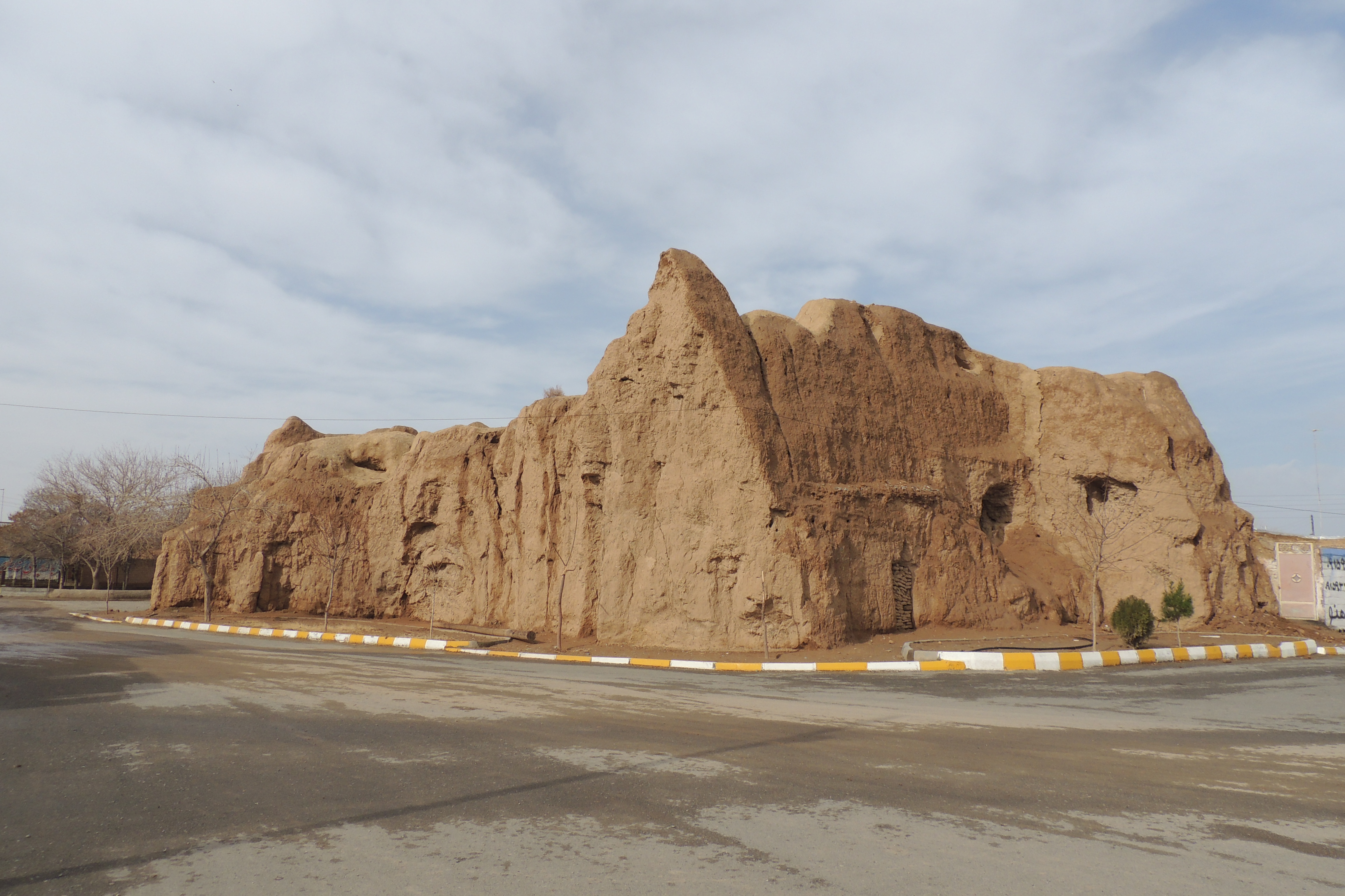 بقایای قلعه کهنه زنده جان